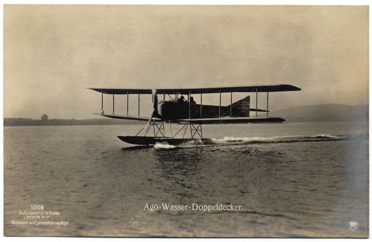 Ago-C Wasserflugzeug